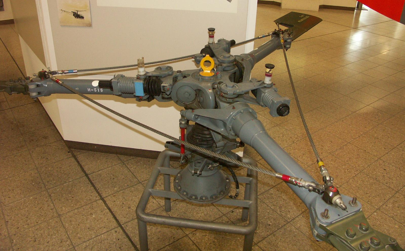 Deutsches Museum Munich Photo: J.-P- Donzey